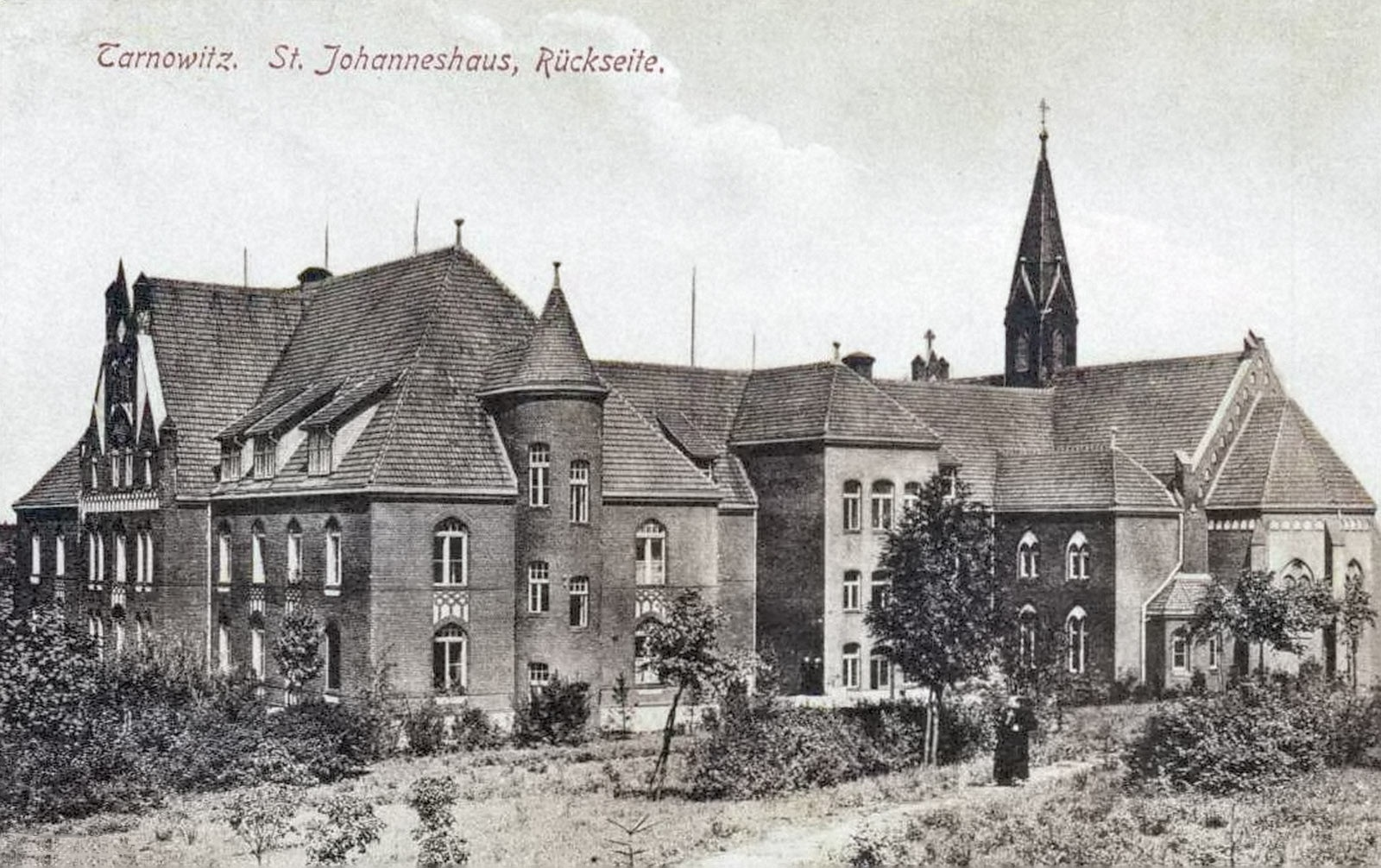 Tarnowskie Góry - Zakład św. Jana - widok od tyłu (od strony południowej), ok. 1905 r.